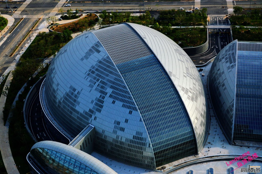 Huaiyin, Jinan, Shandong, China